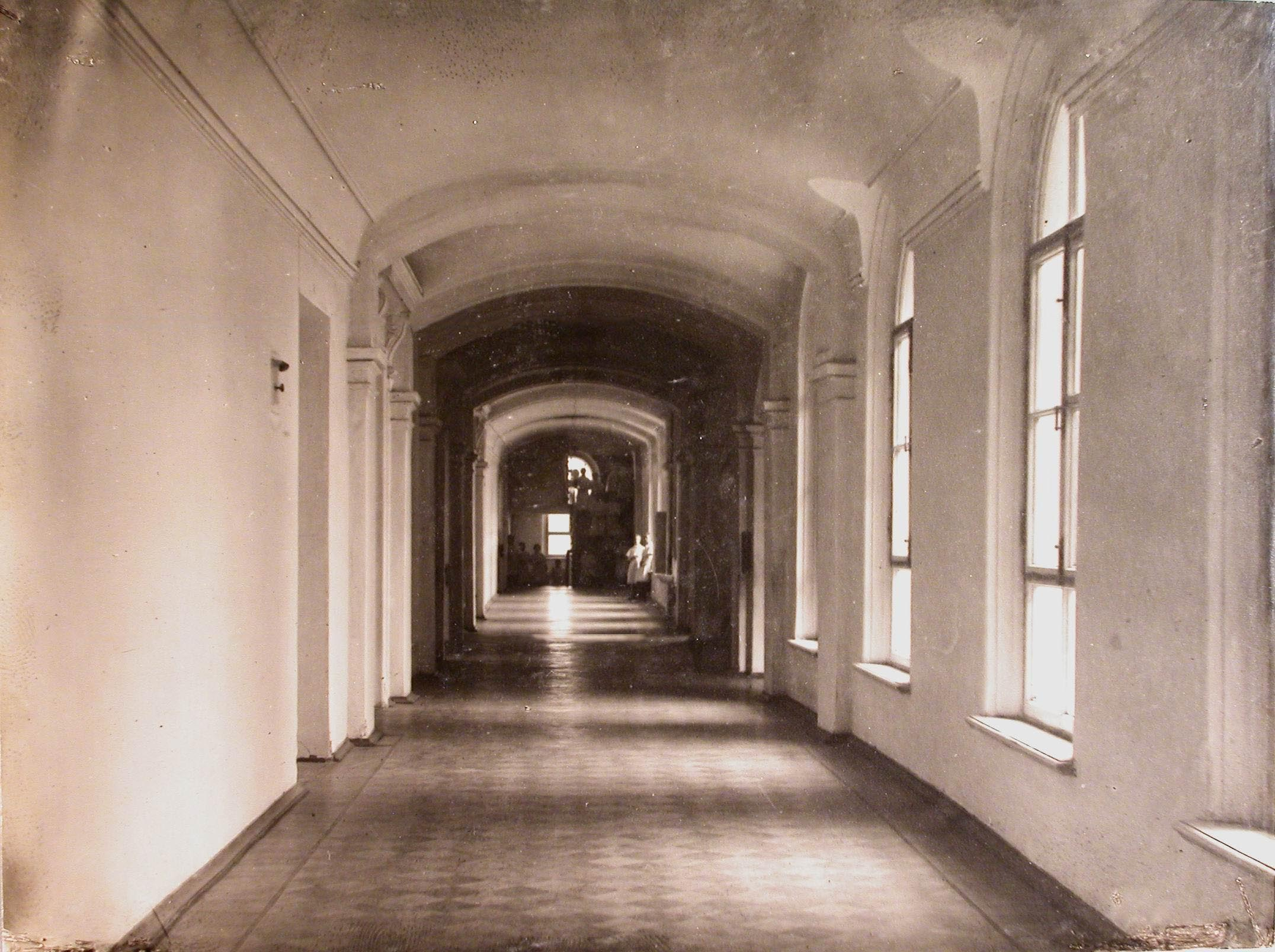 Коридор здания женского епархиального училища. 1914 год.